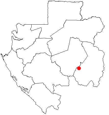 Mounana, Gabon Location Map; created with the GIMP. Made by :en:User:Acntx.